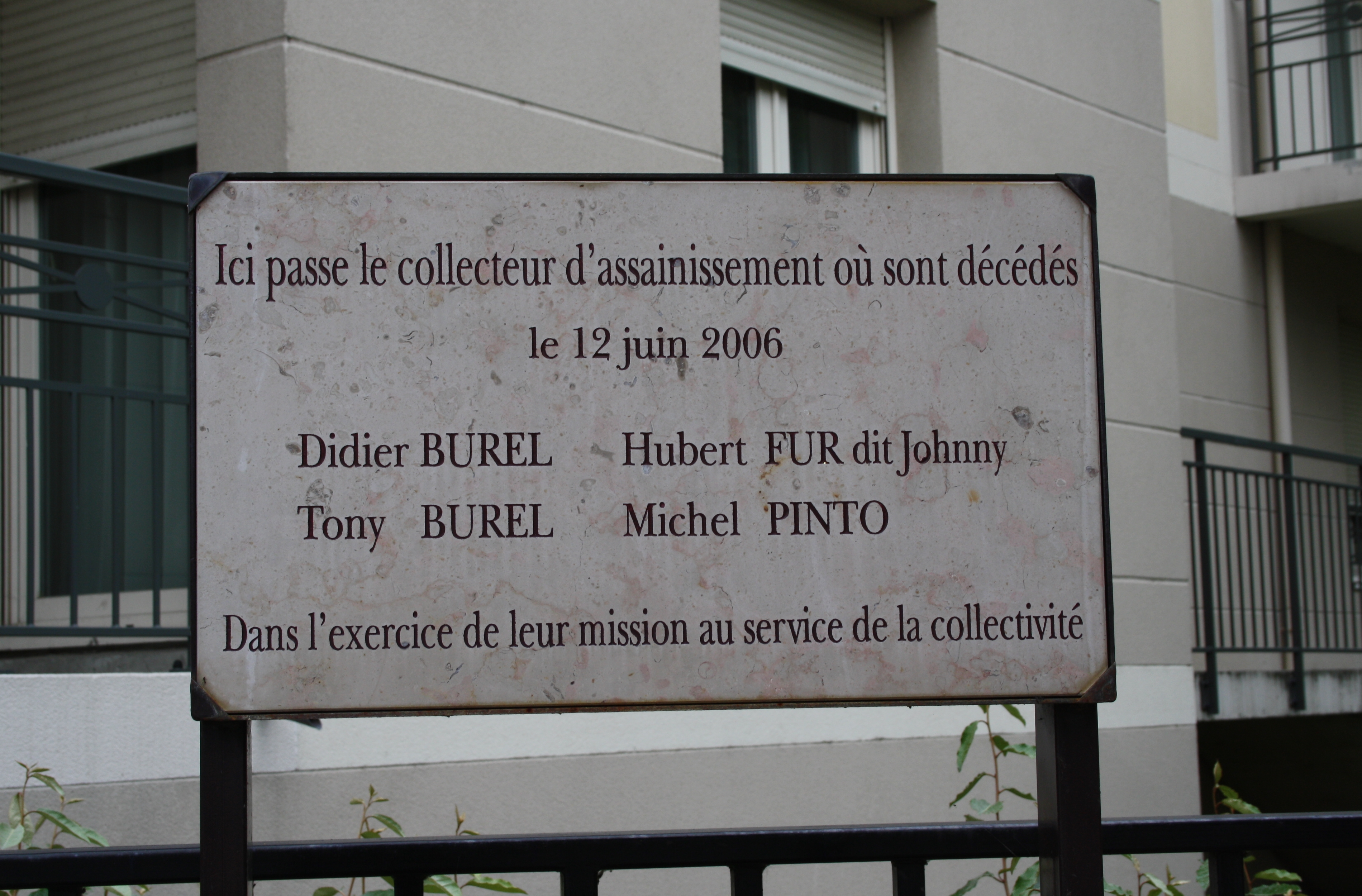 Plaque à la mémoire de Didier Burel, Tony Burel, Michel Pinto, et Hubet Fur.